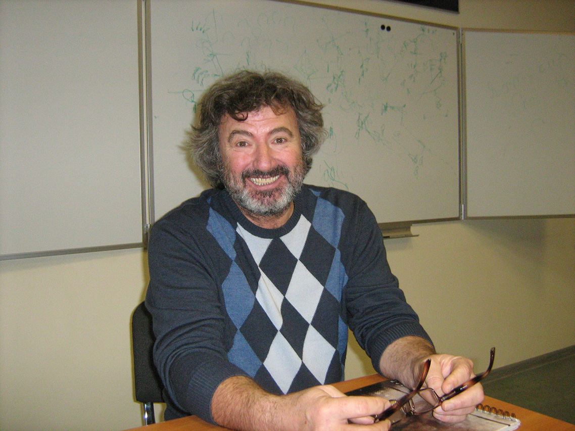 Портрет Хопёрского Олега Николаевича, яхтсмена и тренера России